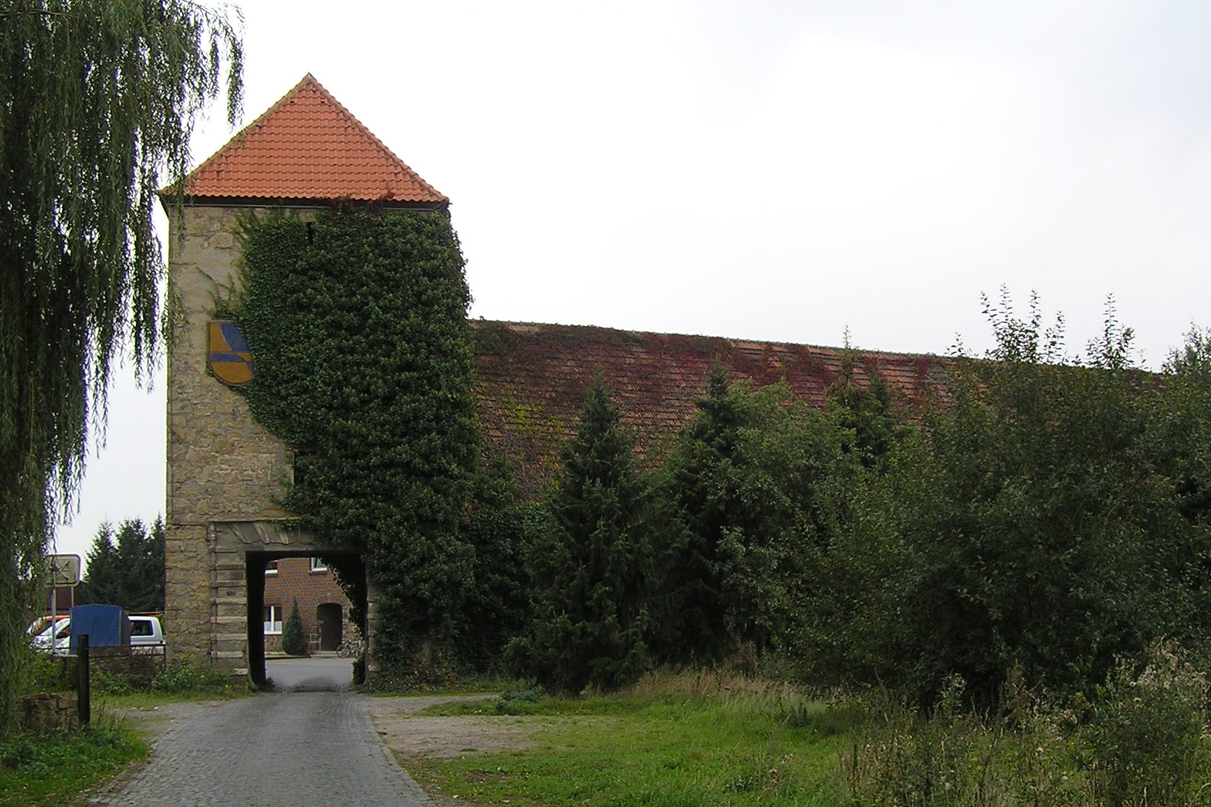 Haus Ostendorf, Haltern-Lippramsdorf